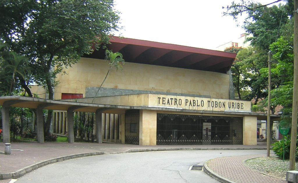 Teatro Pablo Tobon Uribe, Medellín, Colombia